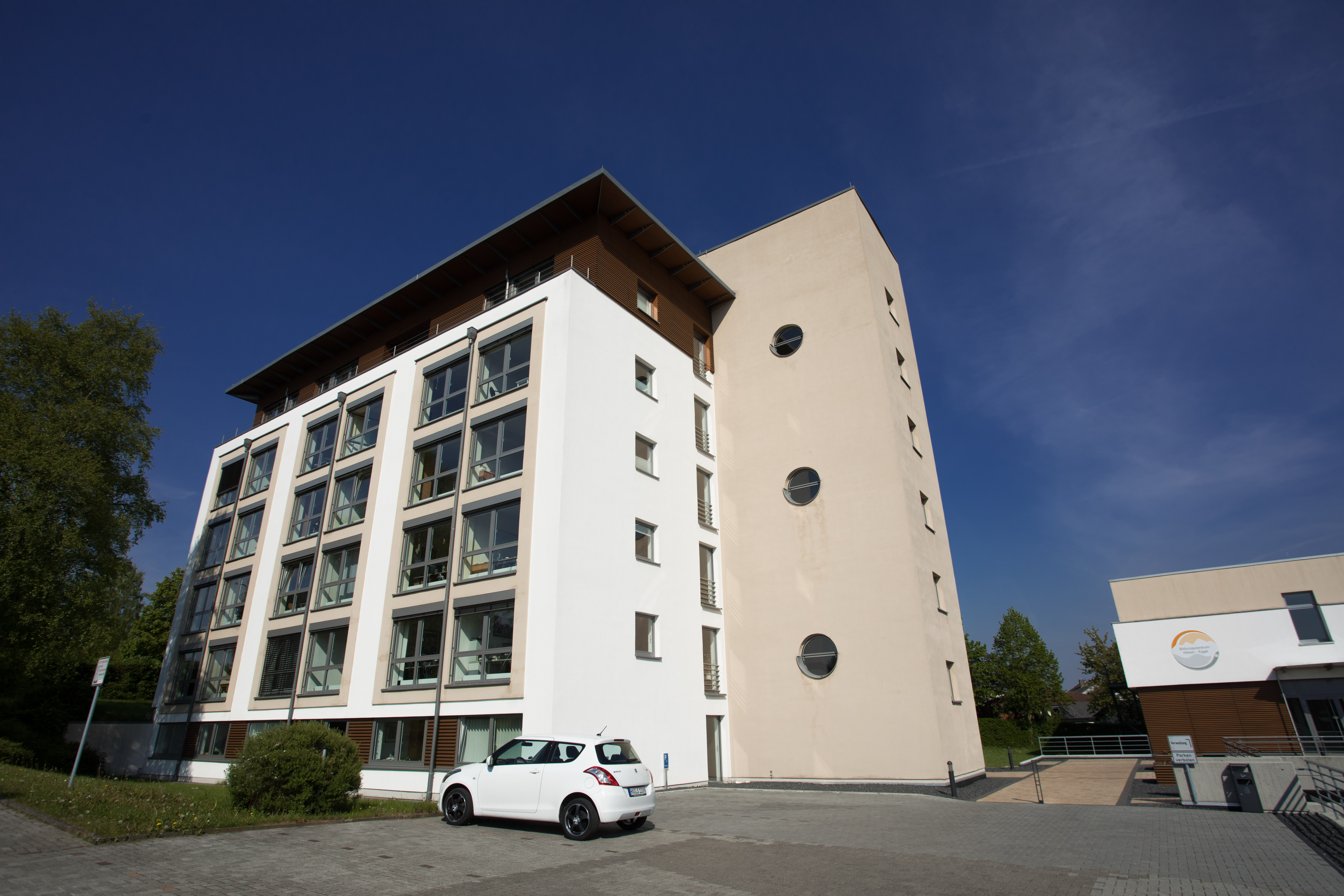 Verwaltungsgebäude 2017; Standort Brakel